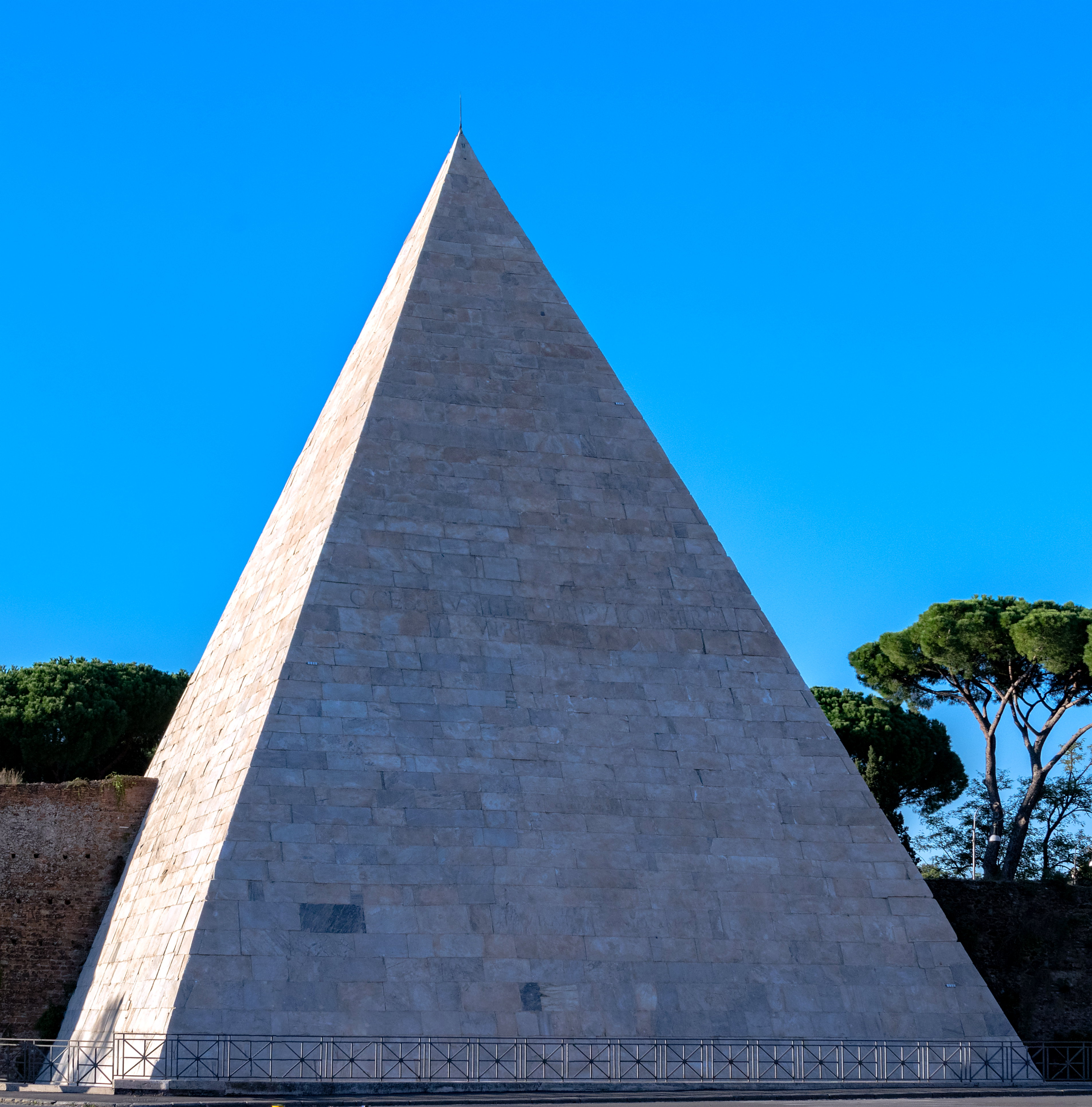 Cestius Pyramide in Rom (Südosten)